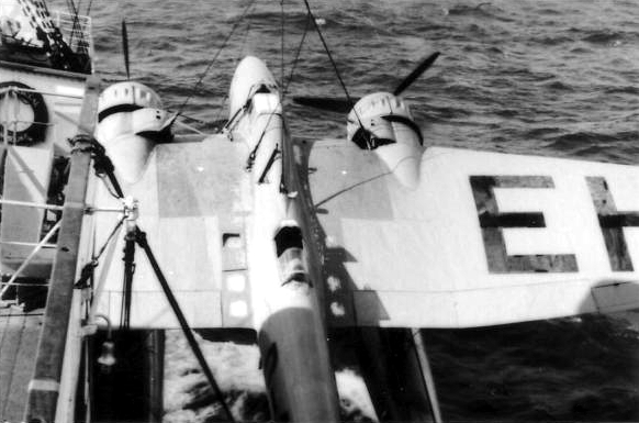 Die HE 115 wird am Ladegeschirr mitgeführt